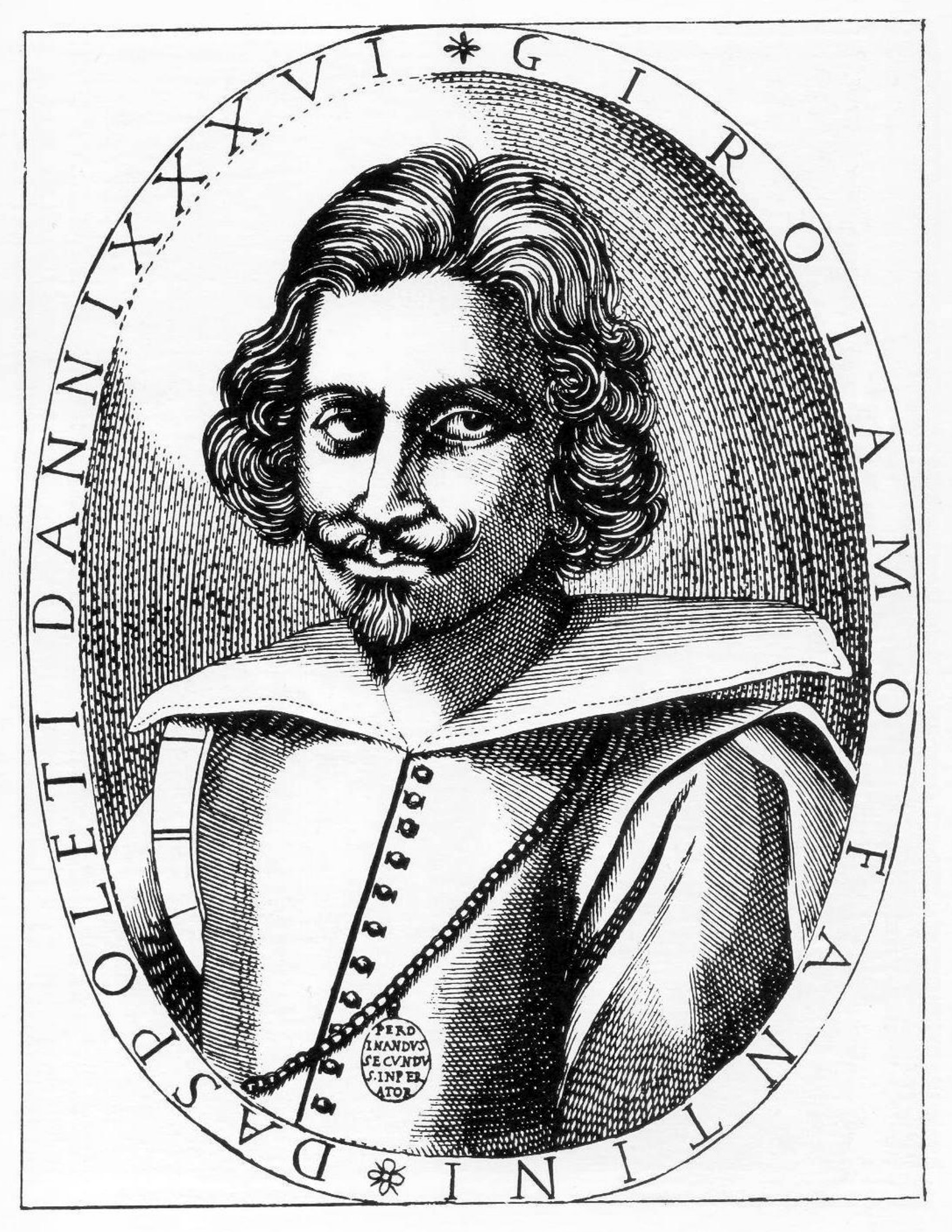 Girolamo Fantini (1600–1675), from Modo per imparare a sonare di tromba (Francfort 1638)